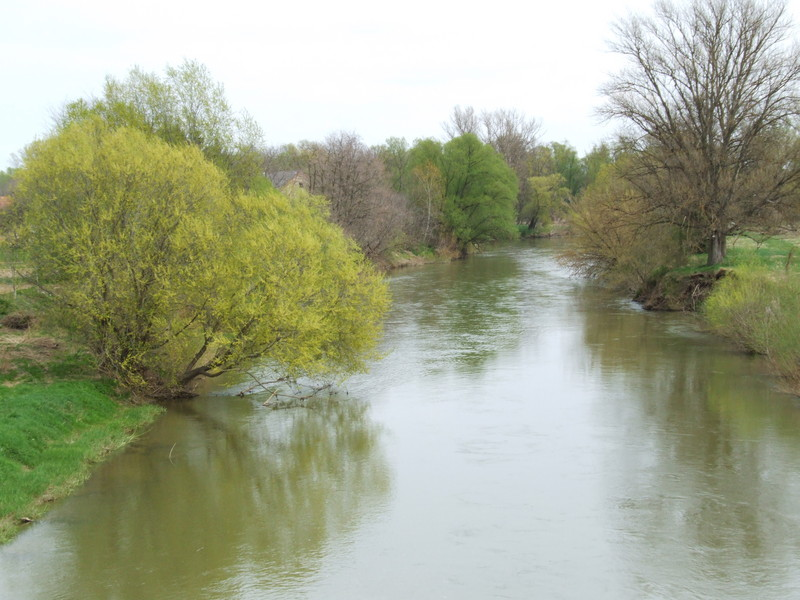 A Rába Molnaszecsődnél (Vas megye)